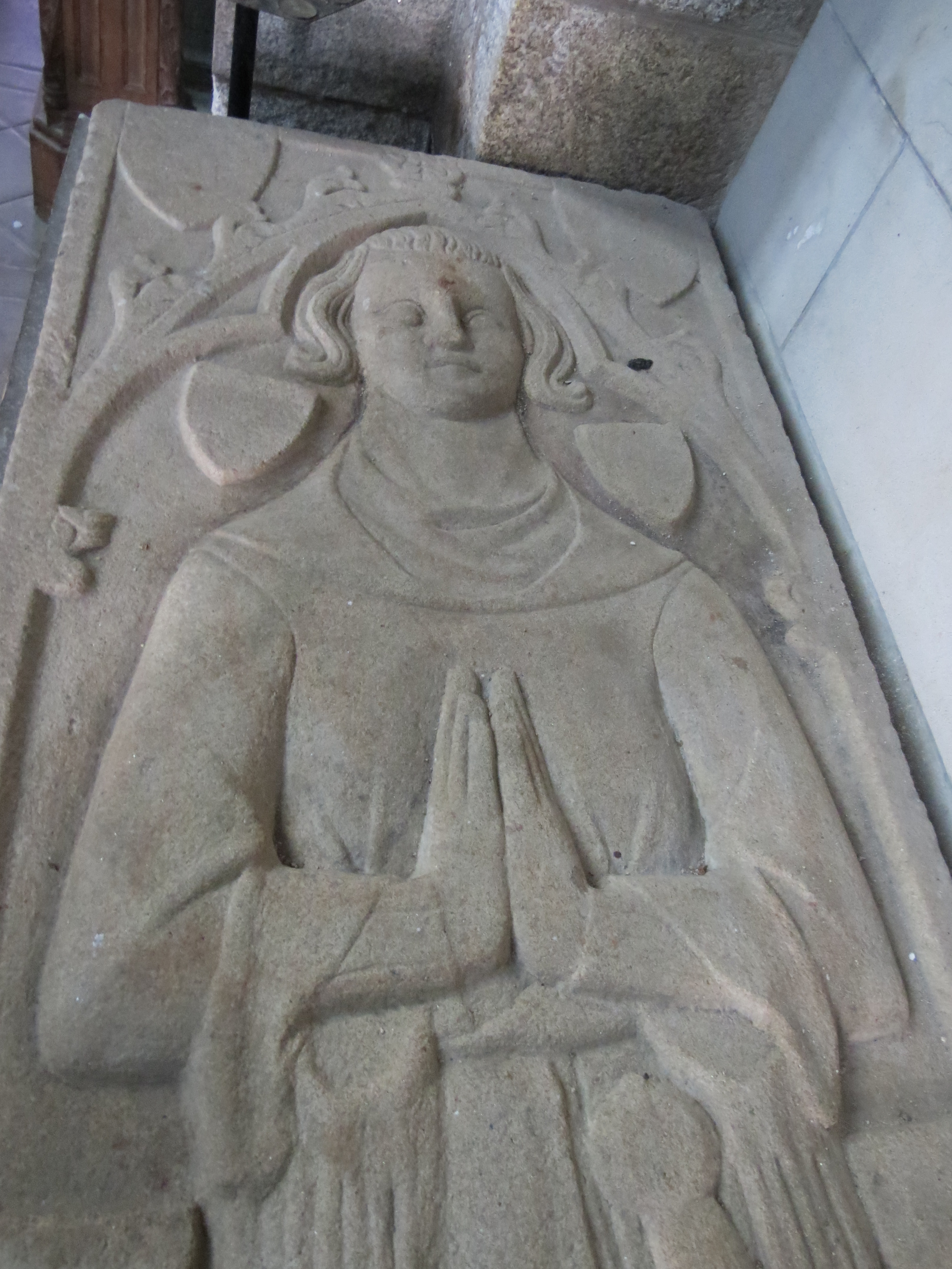 Gisant de Jehan (IV) de Beaumanoir († 1366), maréchal de Bretagne et héros des Trente.